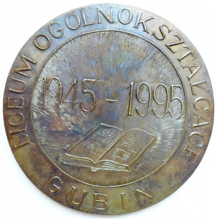 Medal pamiątkowy LO Gubin